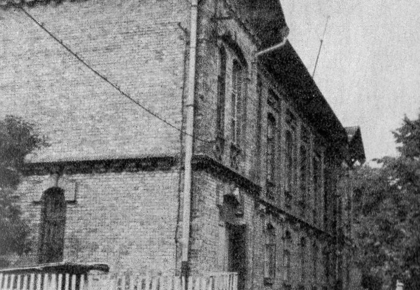 Osada robotnicza Cukrowni Ciechanów w 1983r.